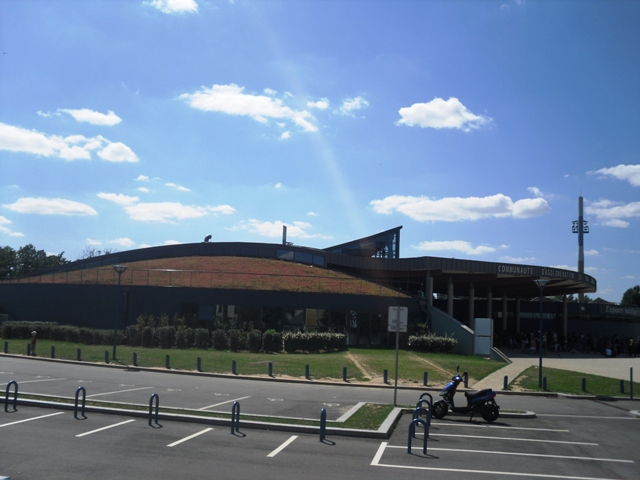 Le centre aquatique intercommunal de Sainte-Geneviève-des-Bois (91)